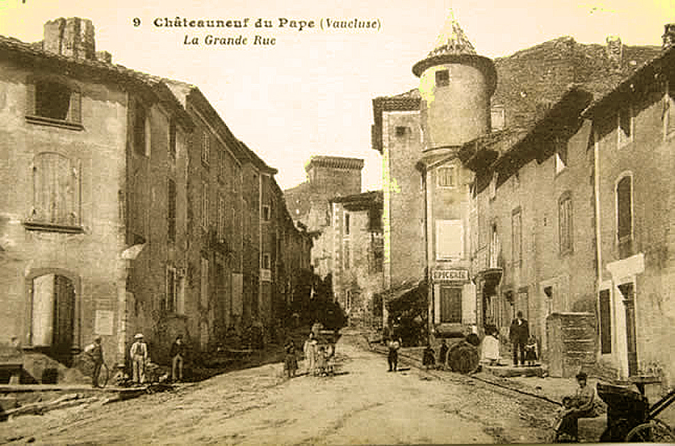 La grand rue de Chateauneuf-du-Pape